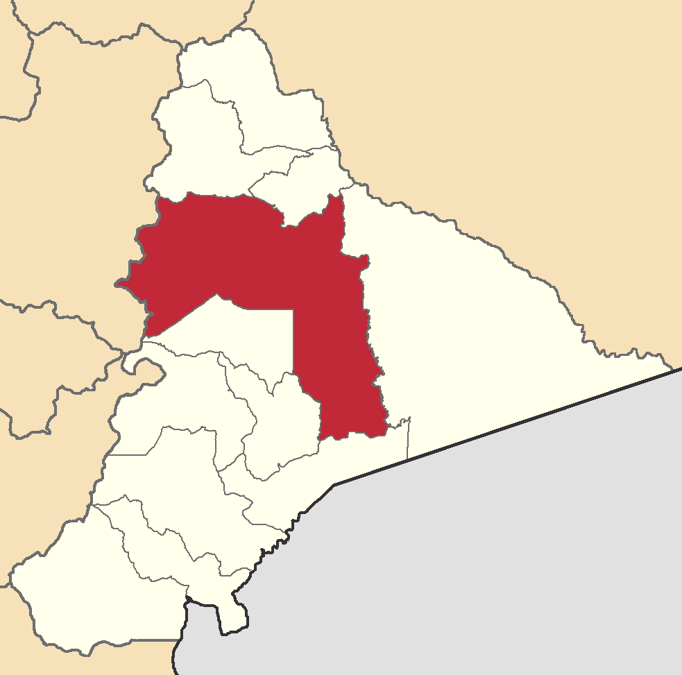 Mapa localizador del cantón en Morona-Santiago, Ecuador